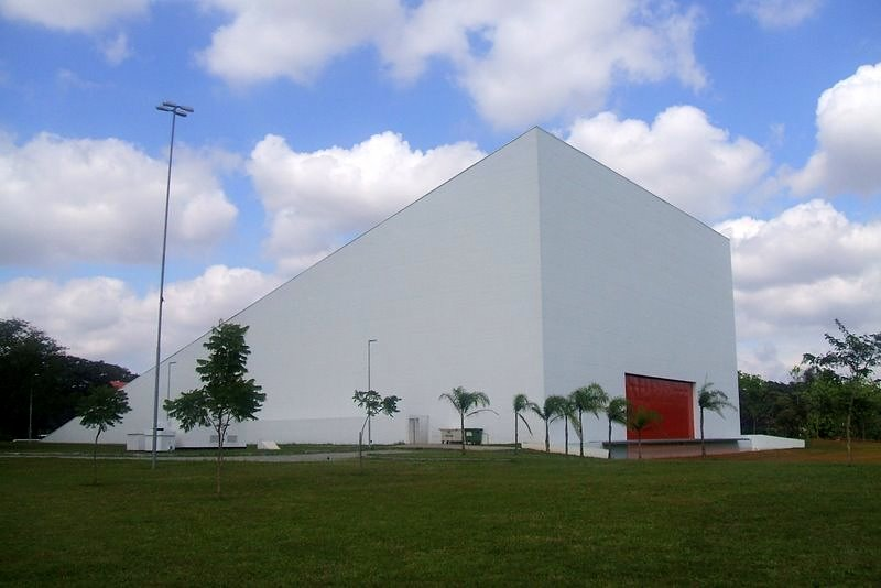 Auditório Ibirapuera, no parque homônimo de São Paulo. Vista da fachada sul, com parede retrátil para concertos ao ar livre.